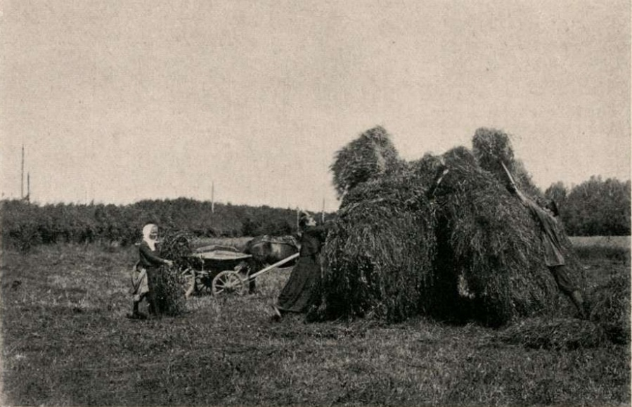 Сушка клевера на жердях - шатром на хуторе Константина Фалена (из книги "Крестьянское хозяйство в России", Халютин, П. В., 1915)